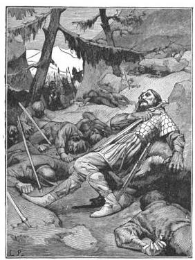 Illustration tirée de Histoire de France, cours élémentaire, Ernest Lavisse, Armand Colin, 1913, page 22 de l'éditon Heath de 1919.